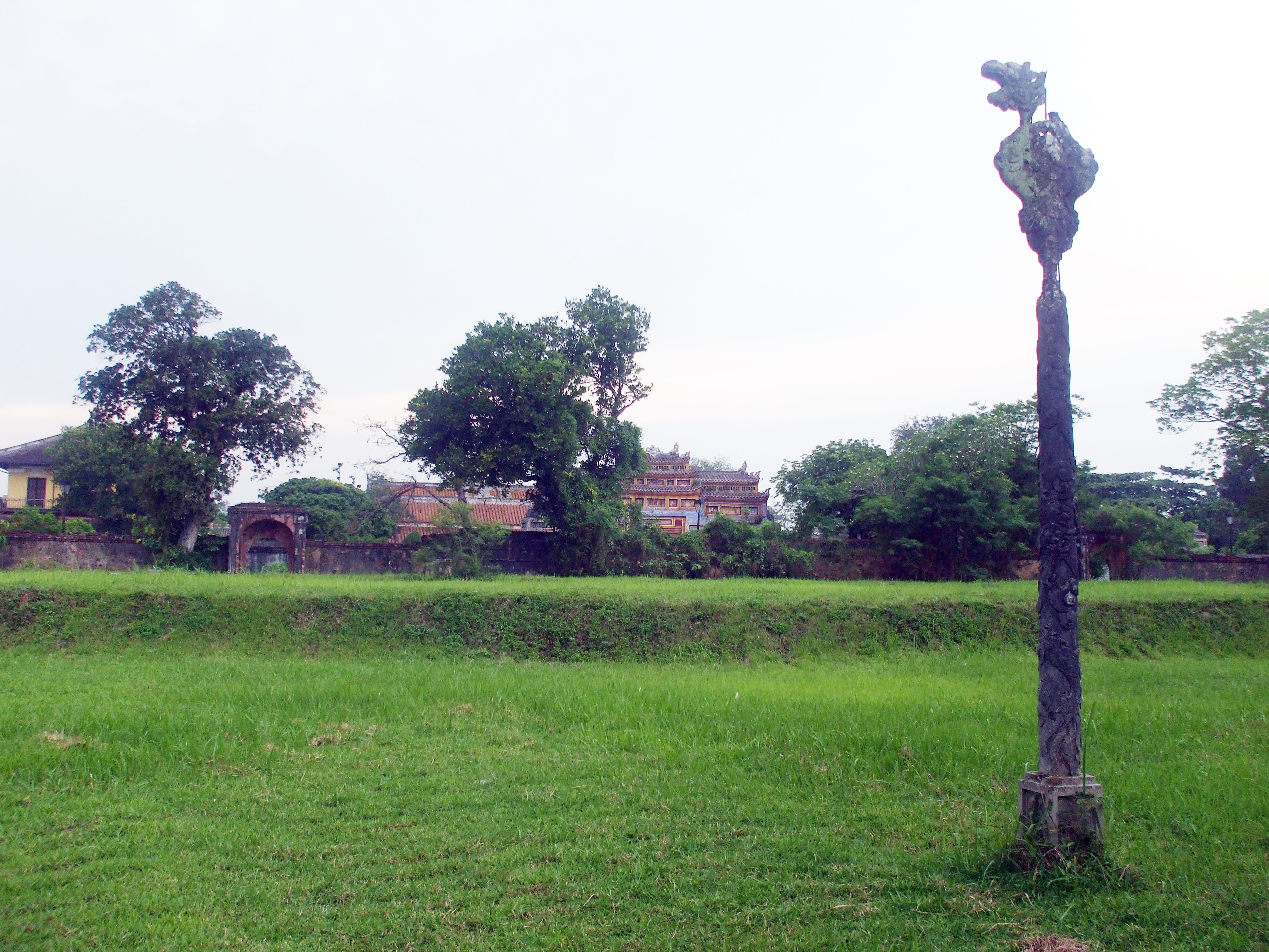 Điện Phụng Tiên dựng năm 1814 trong Tử Cấm Thành Huế, đã bị tàn phá trong chiến tranh năm 1947; nay chỉ còn trơ một cây cột nhỏ và một nền đất đầy cỏ xanh.